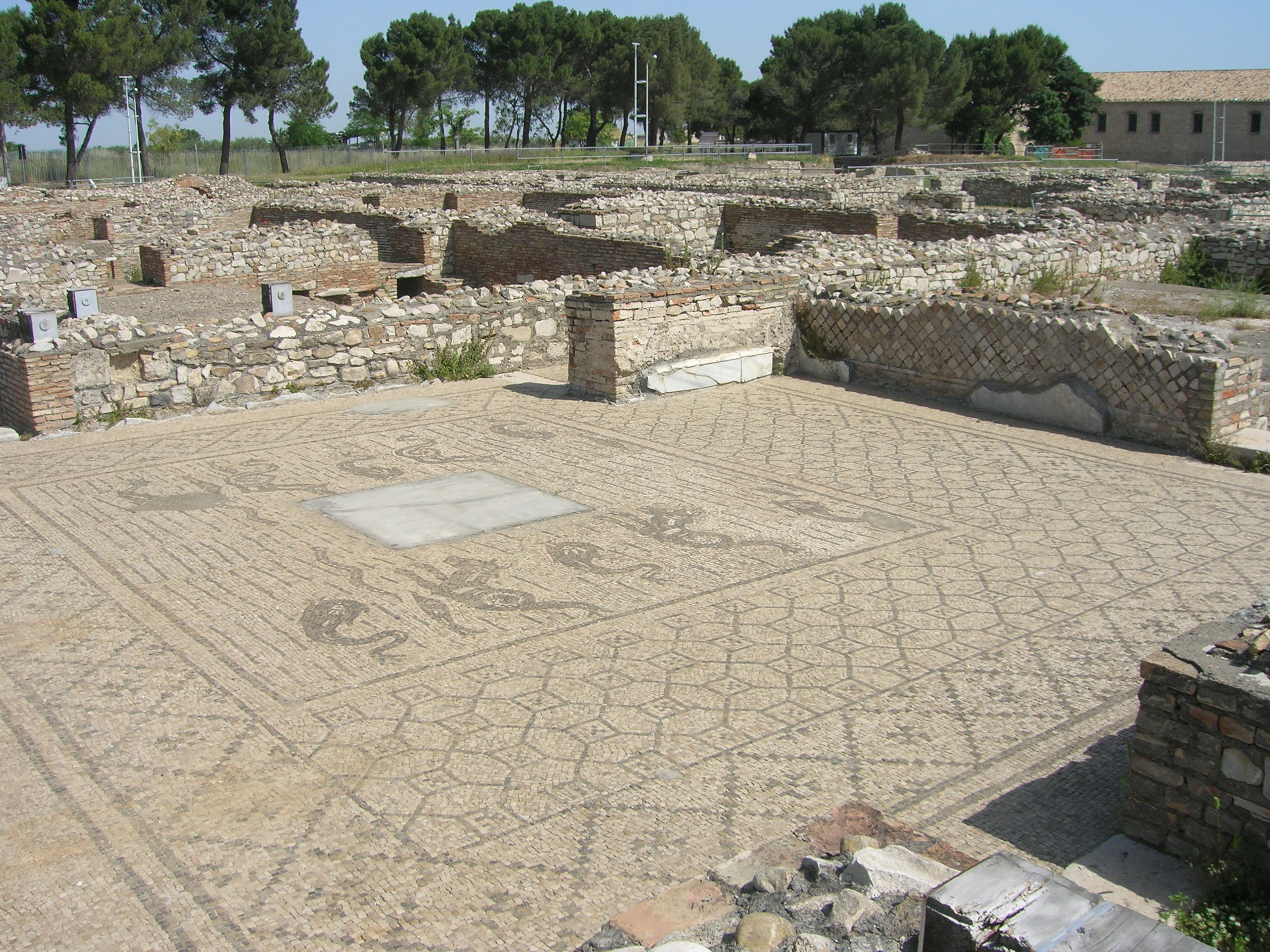 Veduta del Parco Archeologico di Venosa (PZ)